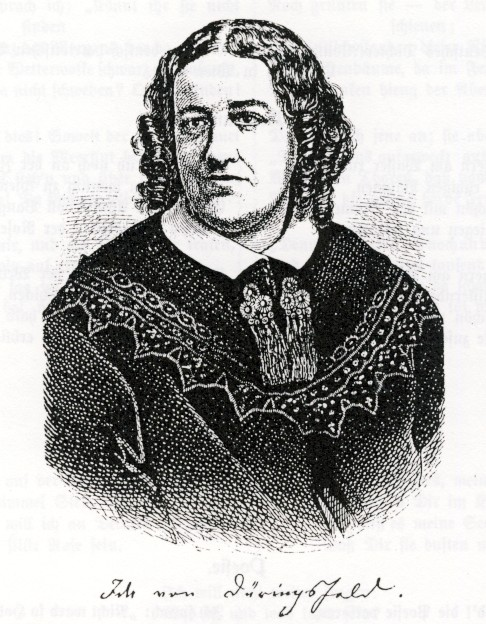 Portrait der deutschen Schriftstellerin Ida von Düringsfeld.